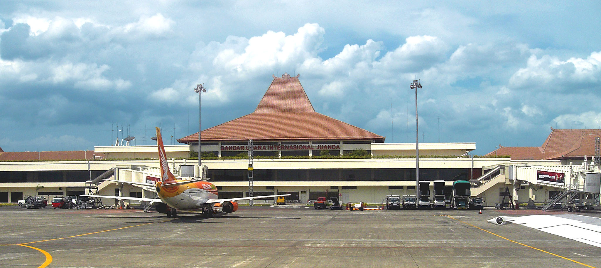 Surabaya Juanda International Airport, Indonesia